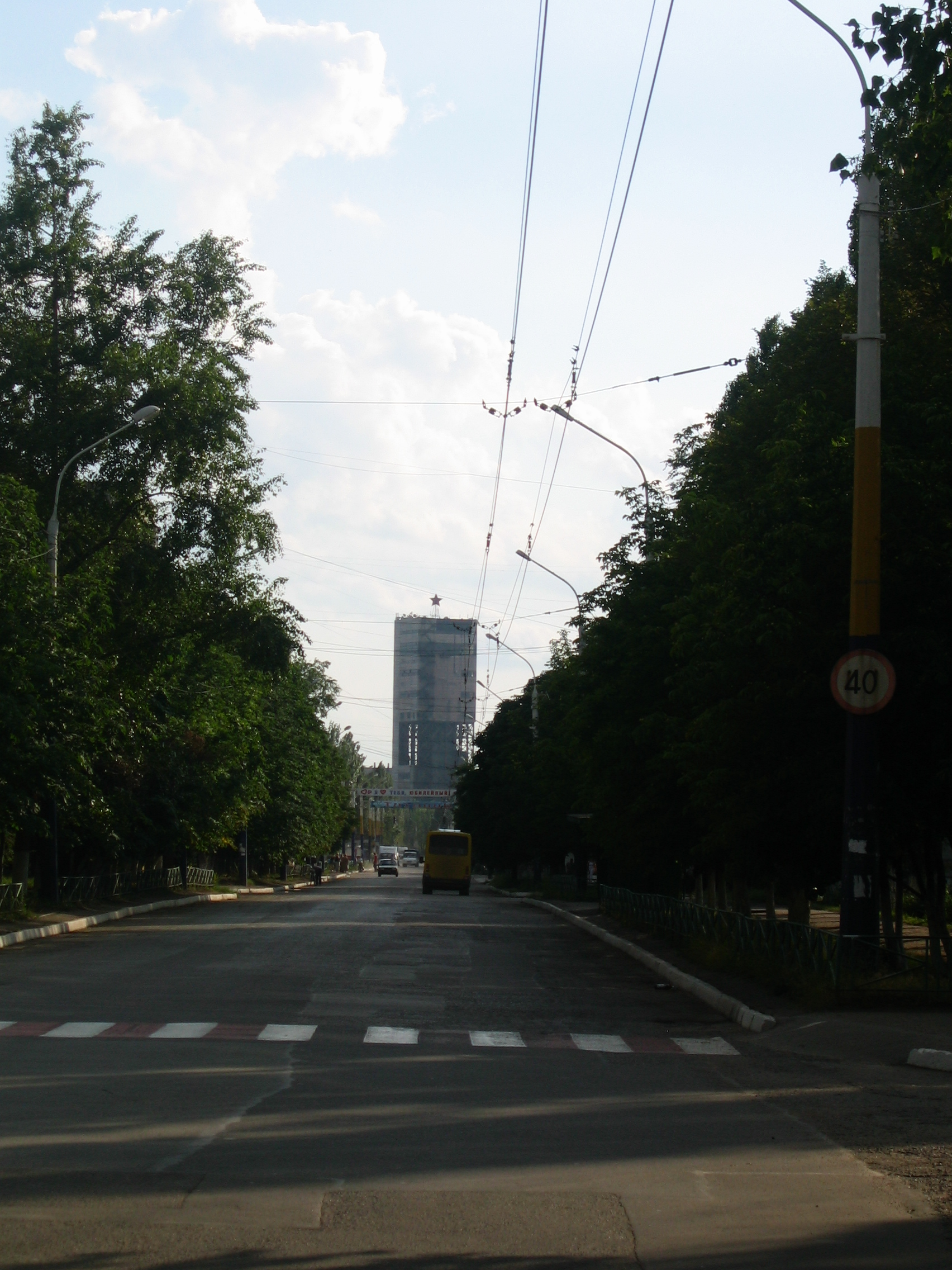 пос. Юбиленый, вид на копер, небоскрёб Юбилейного.